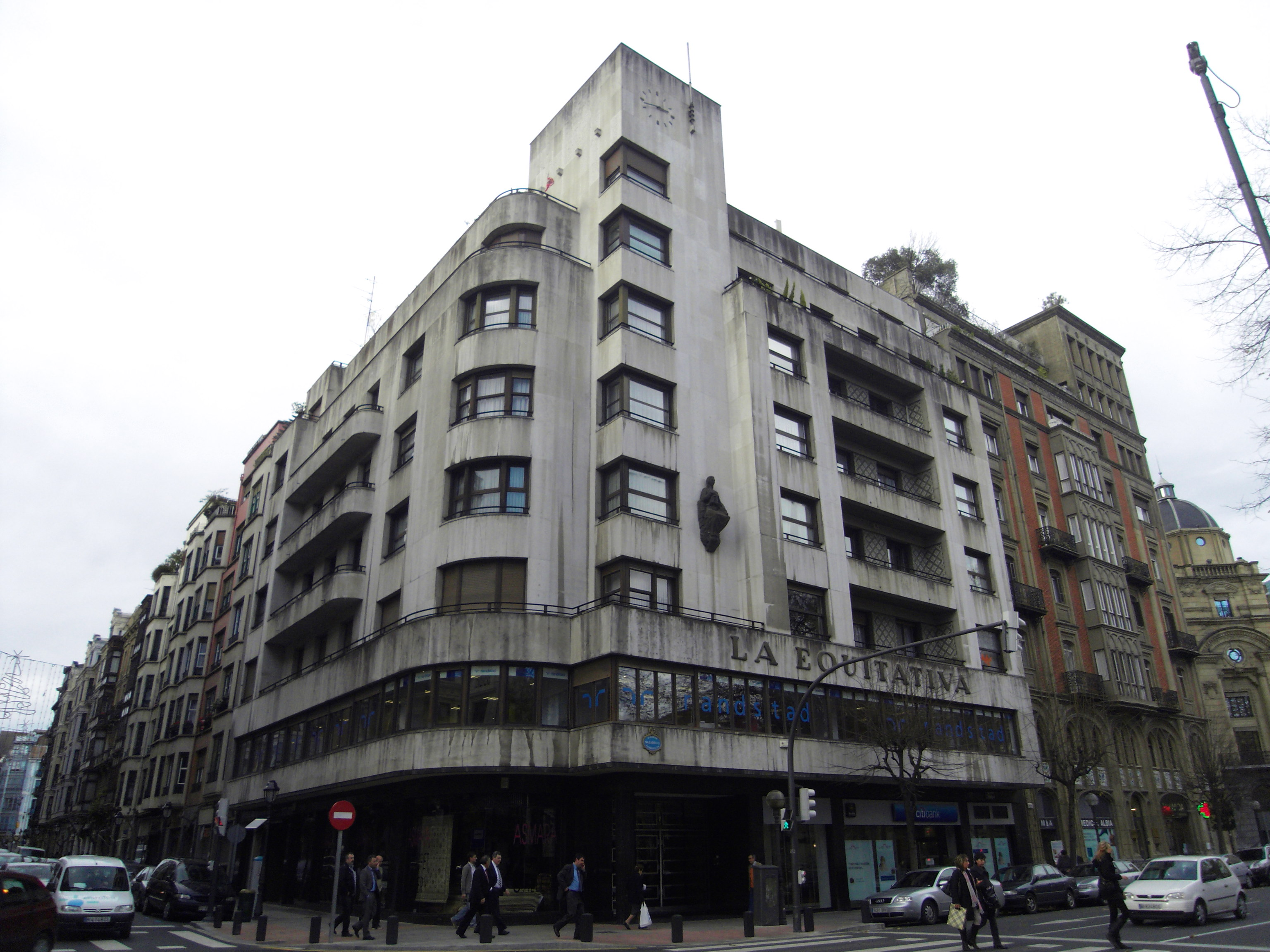 Equitativa eraikinaren bi fatxadak (Mazarredo eta Colon de Larreategi) 1930eko hamarkadako estilo arrazionalistakoak, Bilbo